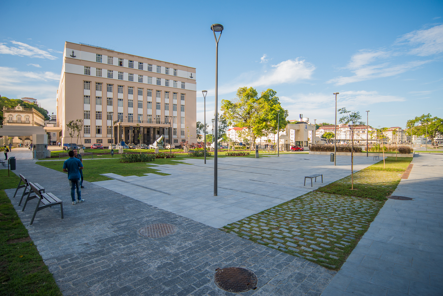 Piso de mosaico da Praça Barão de Ladário, Rio de Janeiro - RJ, Brasil.